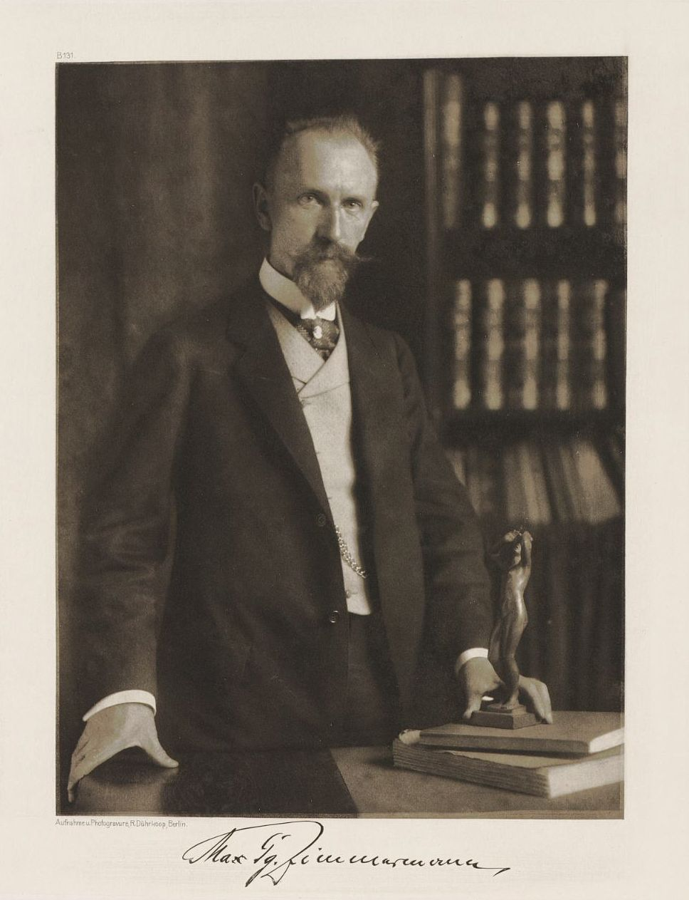 Maximilian Zimmermann. Foto.